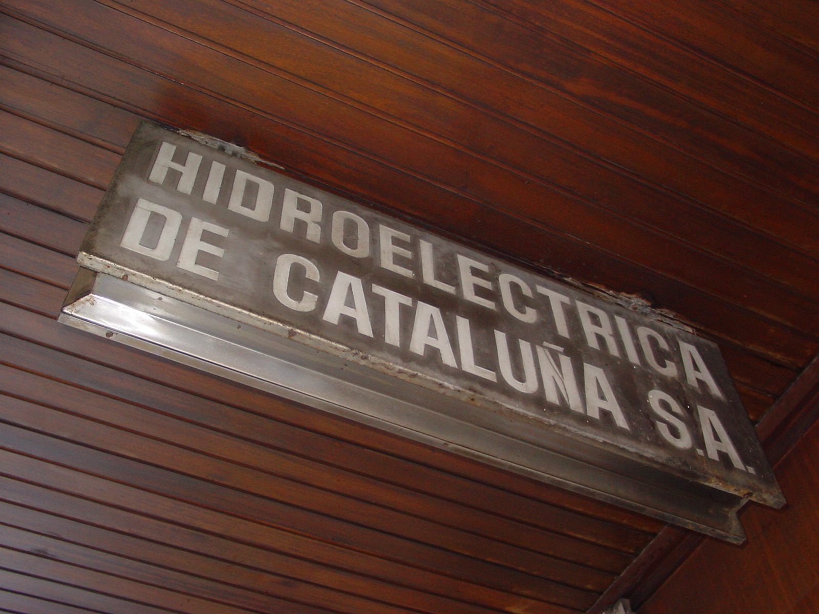 Hidroelectrica de Cataluña, SA